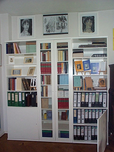 Die Bibliothek der Varnhagen Gesellschaft e.V. besteht ausschließlich aus gespendeten Werken.